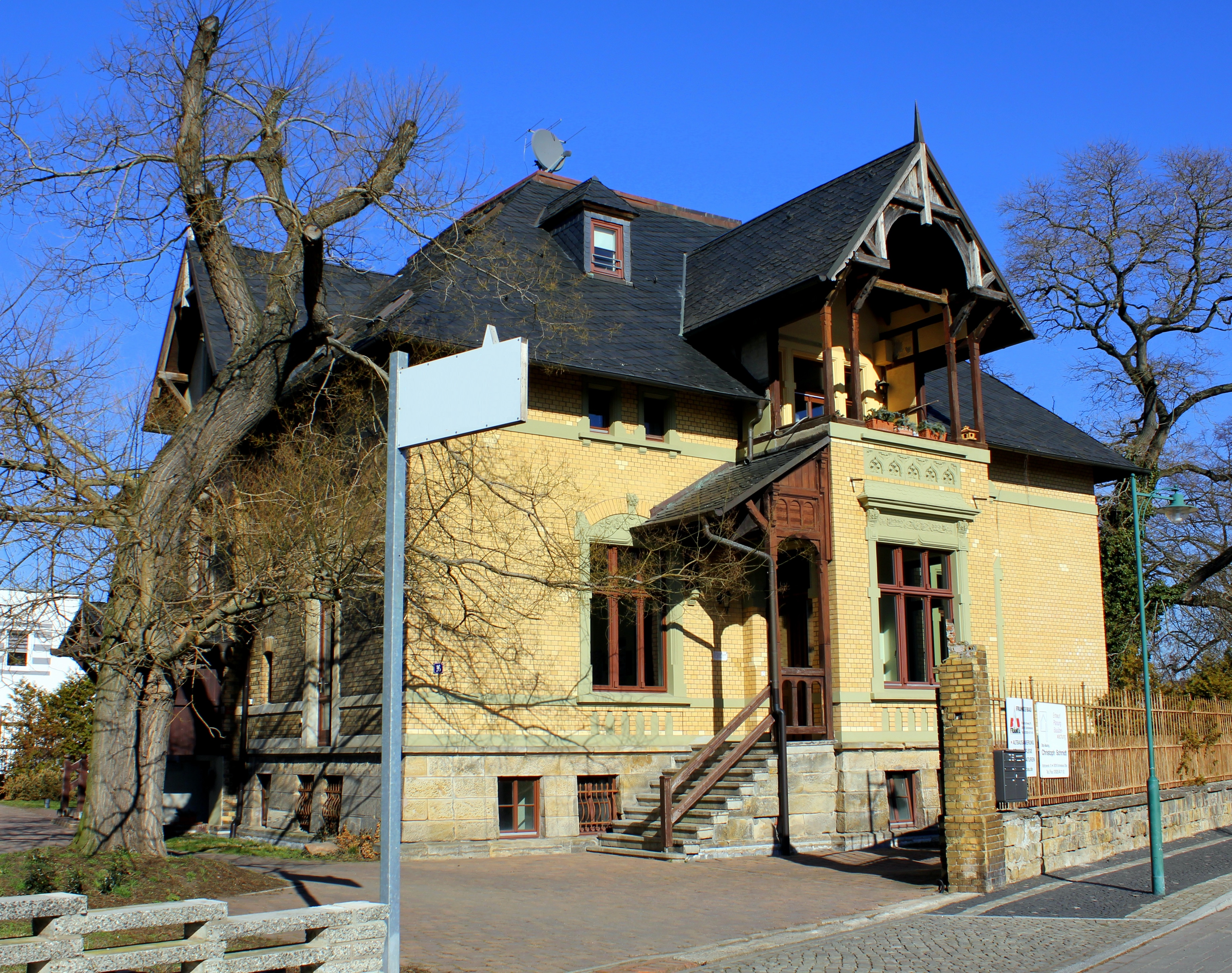 Villa Friedhofsweg 16 Schönebeck-Frohse